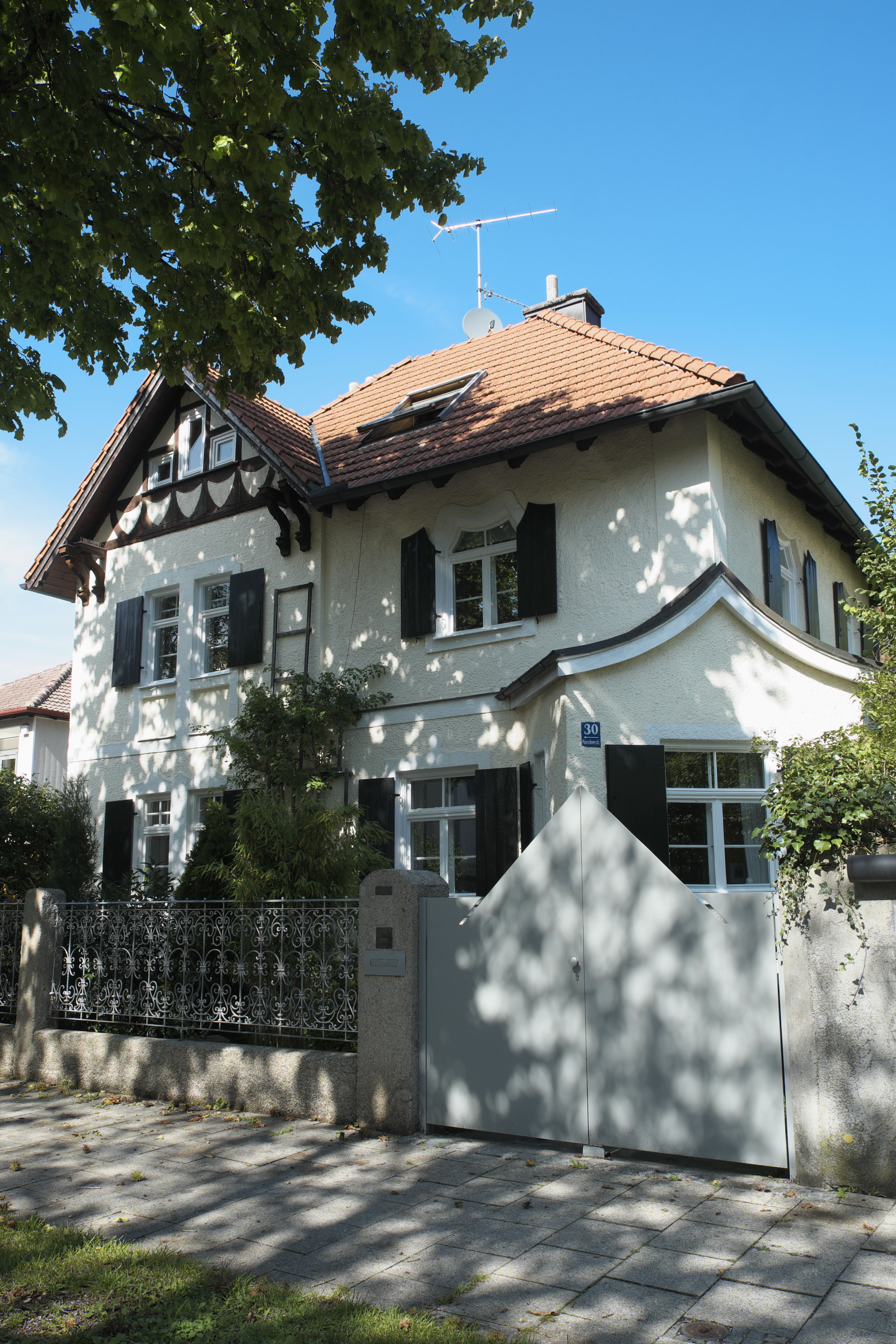 Villa, Marschnerstraße 30, in Pasing im Stadtbezirk Pasing-Obermenzing in München (Bayern/Deutschland), um 1897/1900, aus dem Büro August Exter